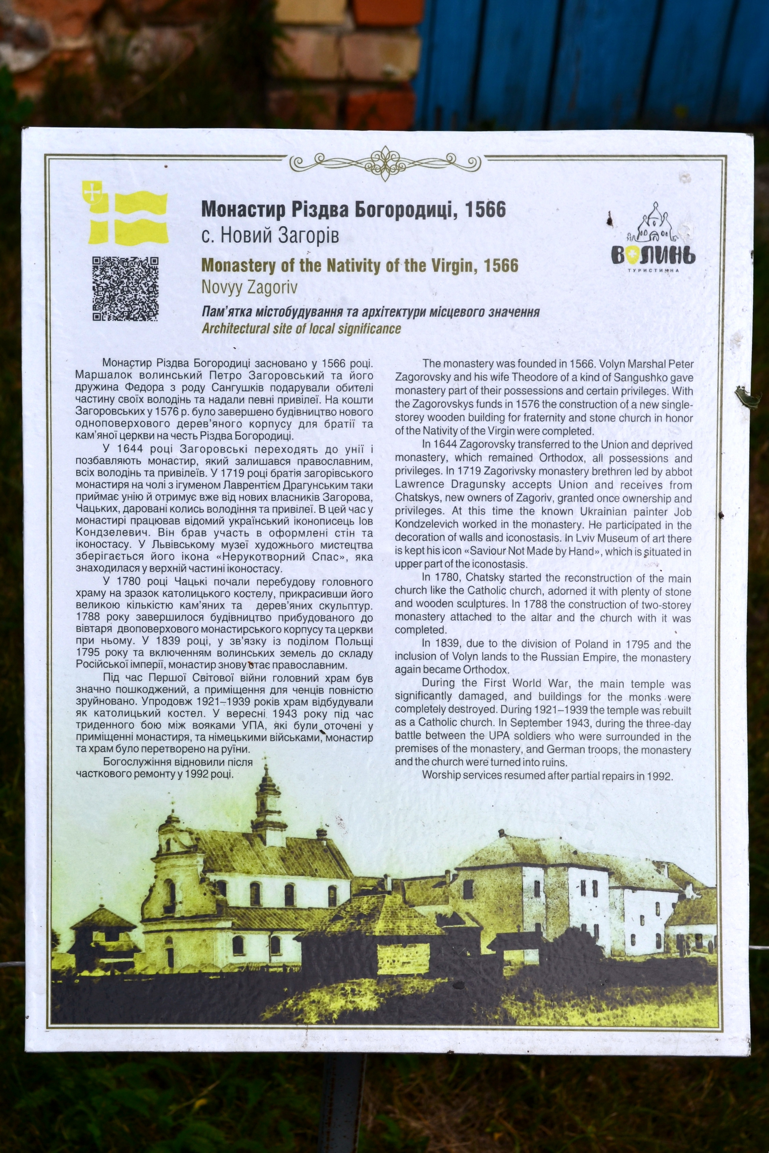 Загорівський монастир (1566 рік) - інформаційна дошка - Новий Загорів (на південній околиці села) Локачинський район Волинська область Україна